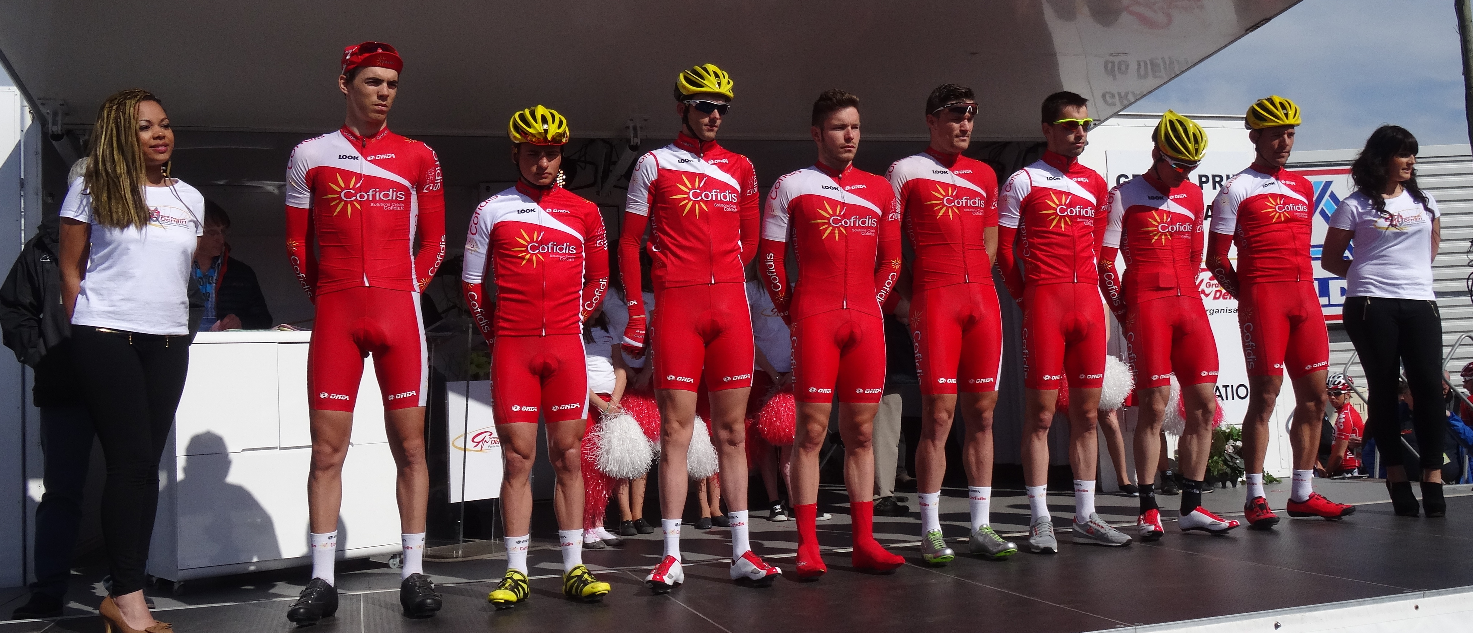 Reportage réalisé le jeudi 17 avril à l'occasion du départ et de l'arrivée du Grand Prix de Denain 2014 à Denain, Nord, Nord-Pas-de-Calais, France.